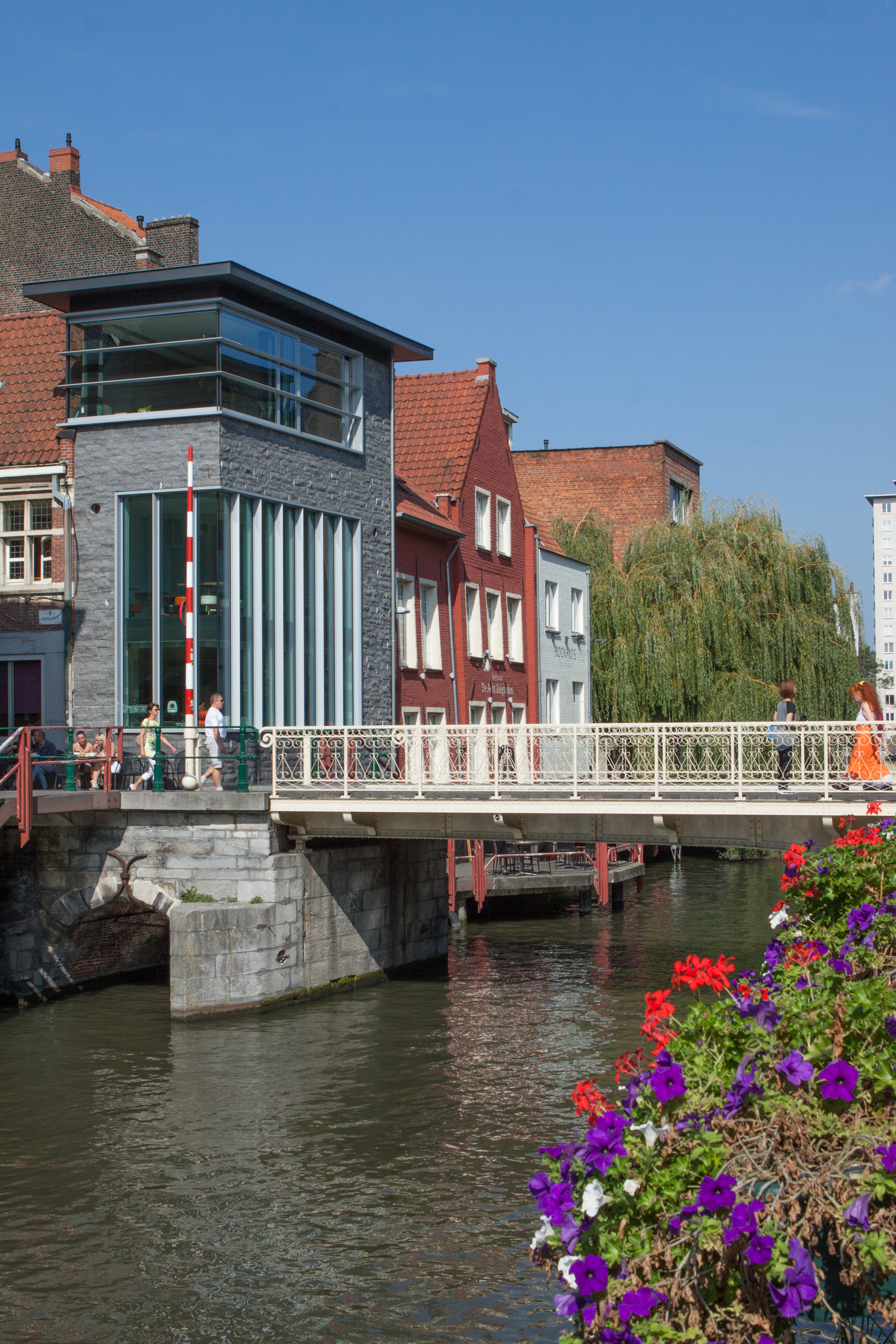 Zuivelbrug